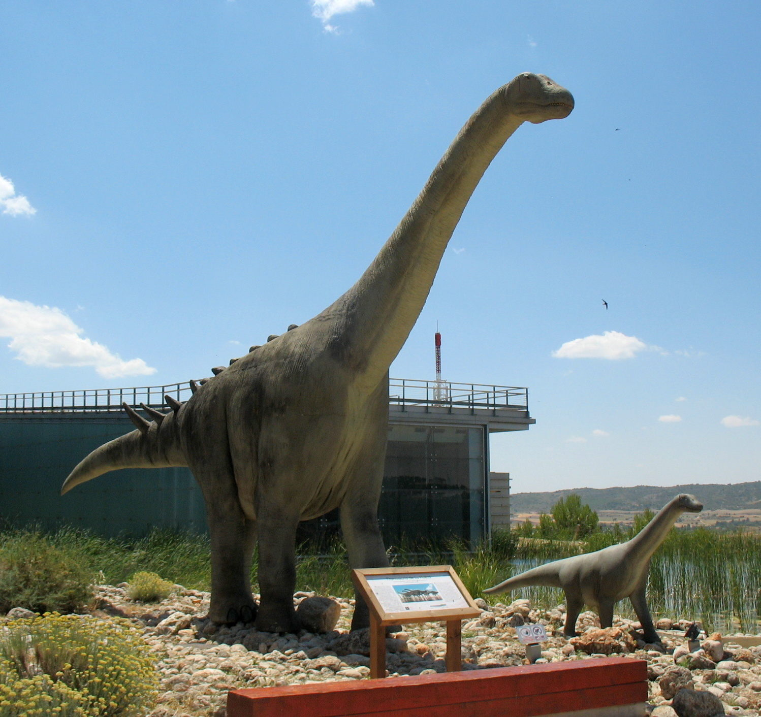 Figura de Lohuecotitan pandafilandi de Lo Hueco. Museo Paleontológico de Castilla-La Mancha (Cuenca, España)